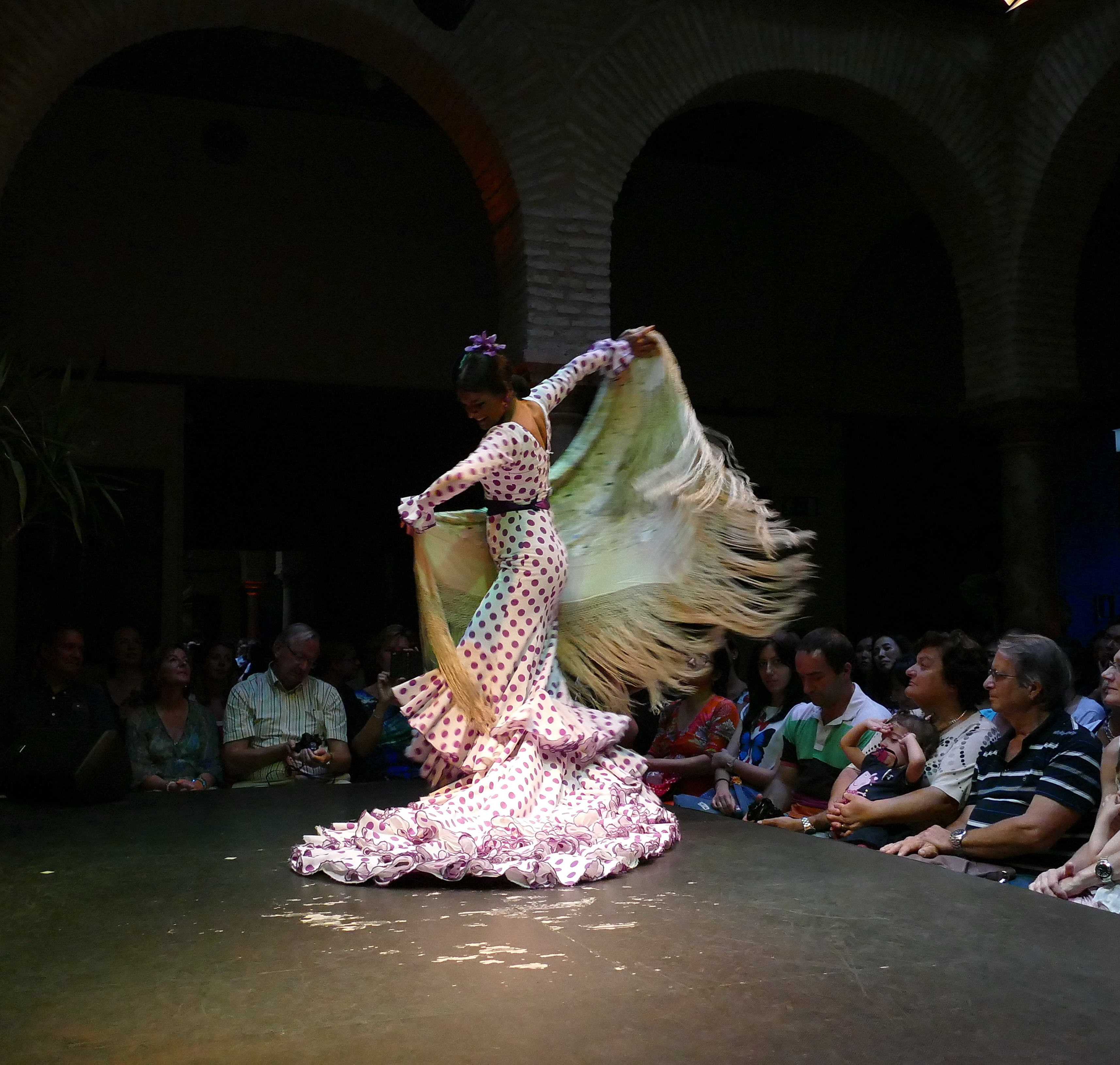 Flamencotänzerin im Museo del baile flamenco in Sevilla